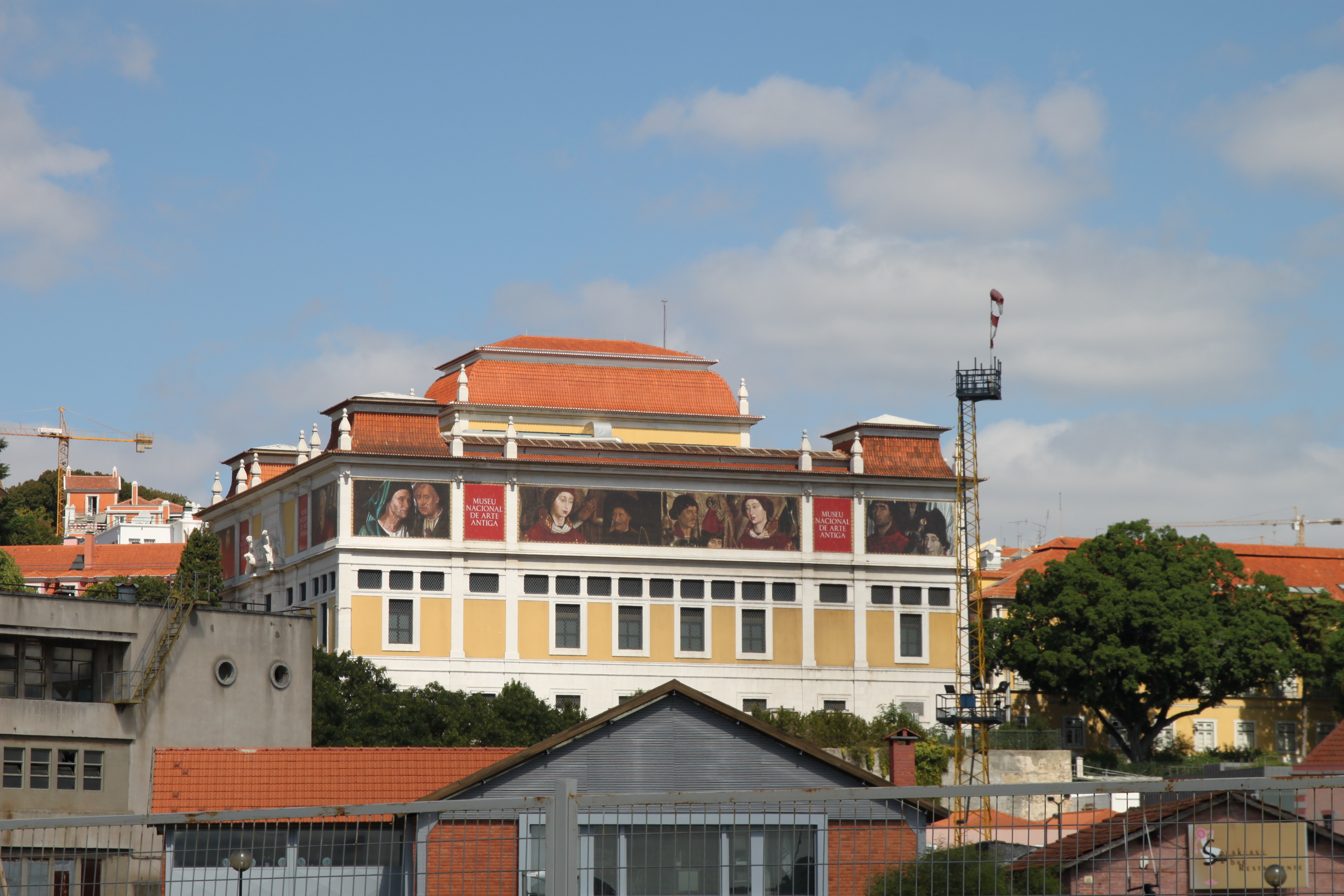 Museu Nacional de Arte Antiga, Museu das Janelas Verdes ou Palácio Alvor This file was uploaded for Wiki Loves Monuments in Portugal with the unique identifier 73649.